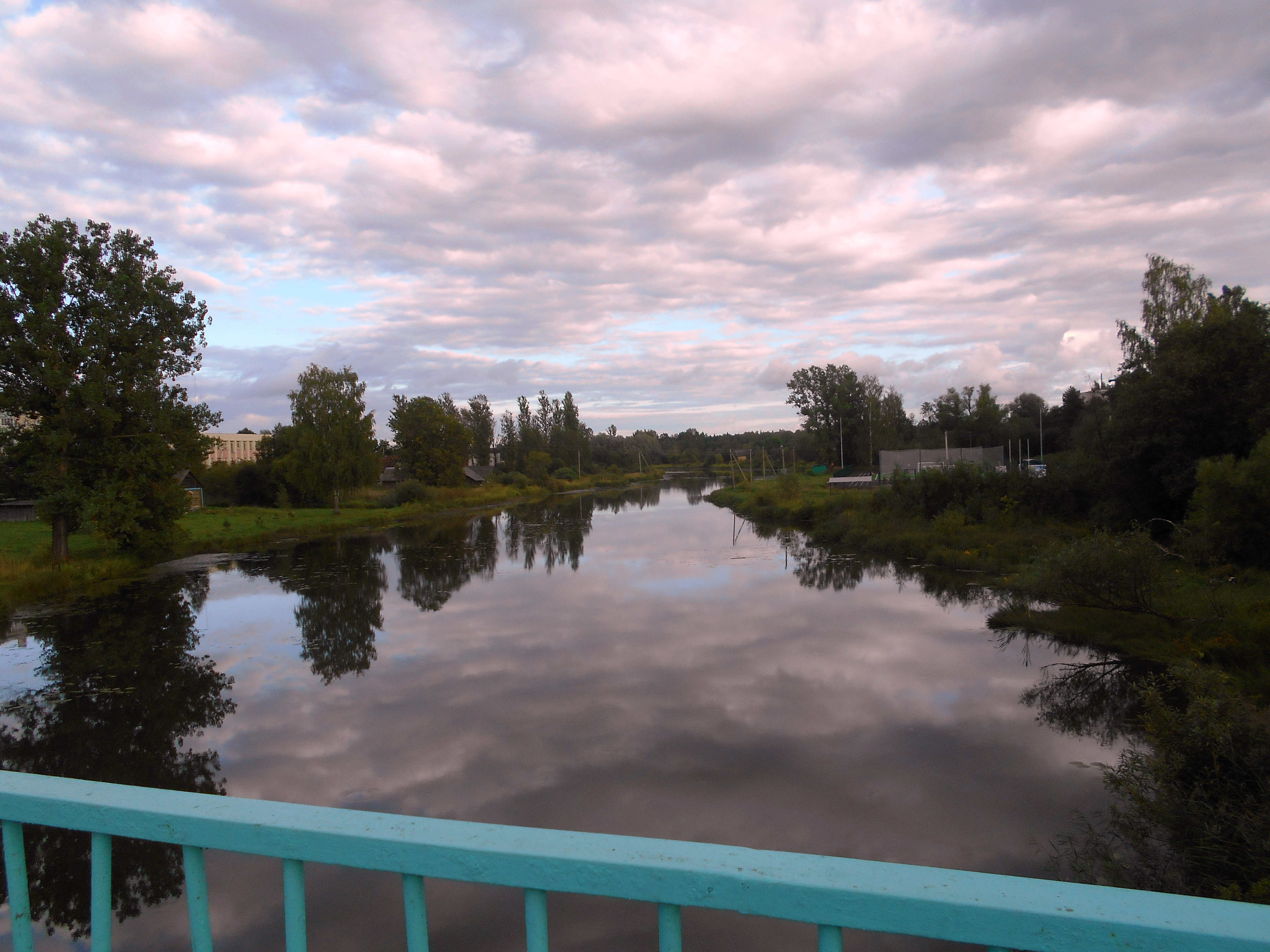 Село Большое Село (Ярославская обл.) расположено на реке Юхоть. Точка съёмки 57.720431, 38.940390